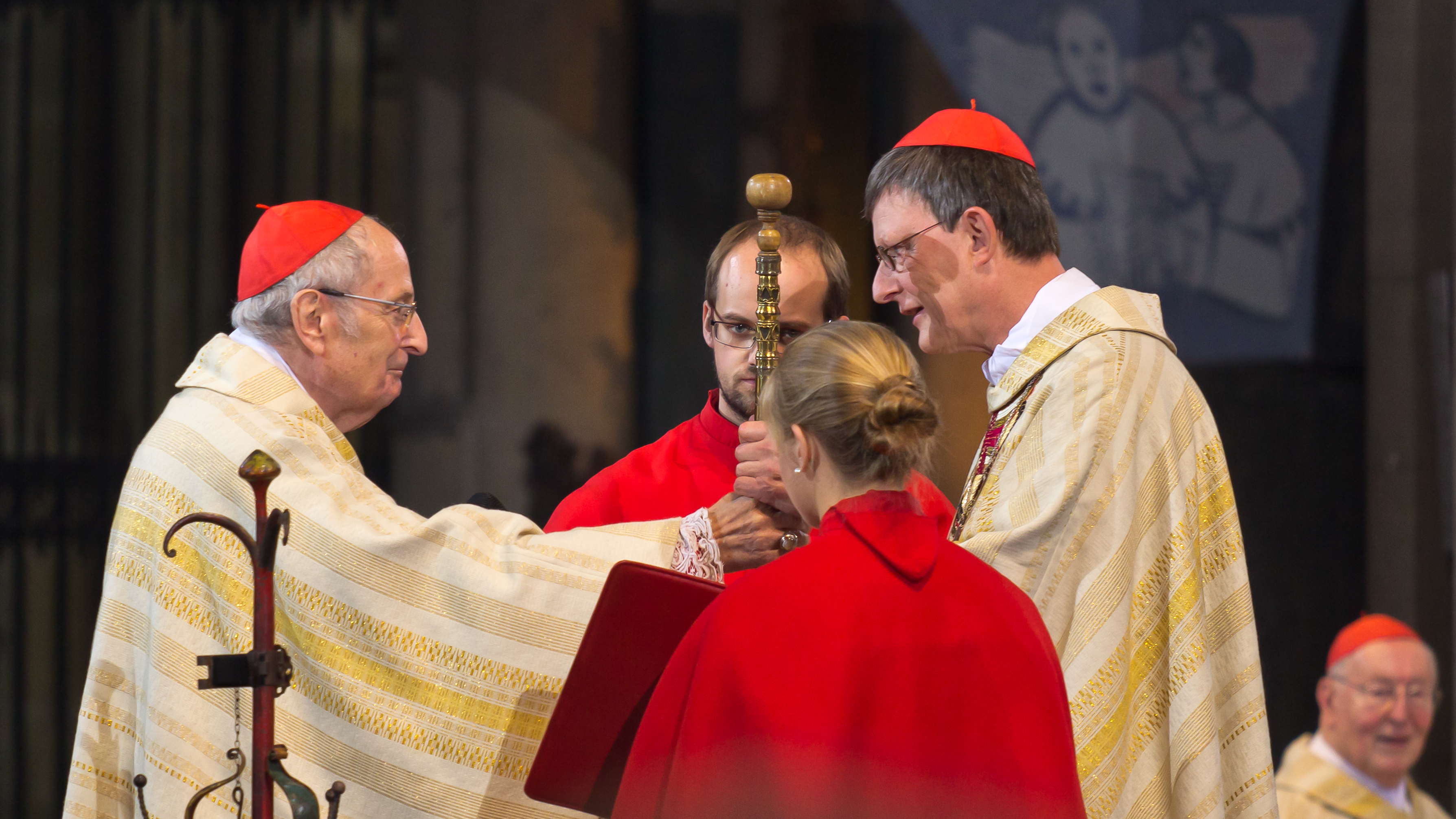 Feier zur Amtseinführung des Erzbischofs von Köln Rainer Maria Kardinal Woelki im Hohen Dom zu Köln Foto: Der emeritierte Erzbischof von Köln, Kardinal Meisner, überreicht den Petrusstab an seinen Nachfolger, Kardinal Woelki